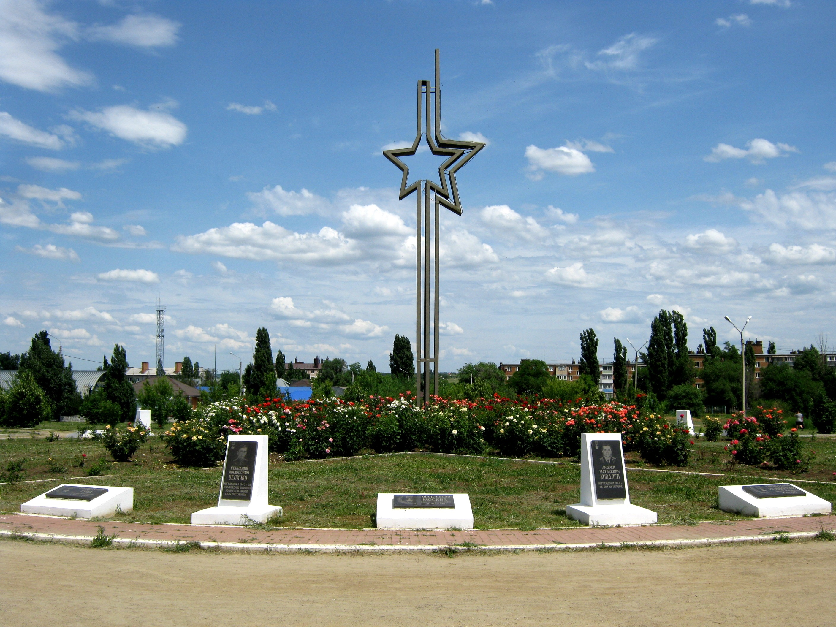 Каменск - парк Победы